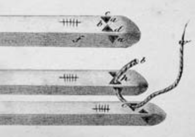 Floßaugen oder Wiedlöcher nach Karl Friedrich Victor Jägerschmidt (1828) zur Floßholzbindung, d.h. dem Einbinden von Bauholz in Föße